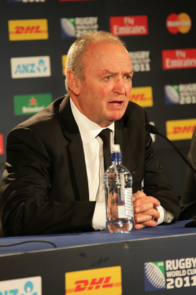 COUPE DU MONDE DE RUGBY 2011 NOUVELLE ZELANDE ARGENTINE